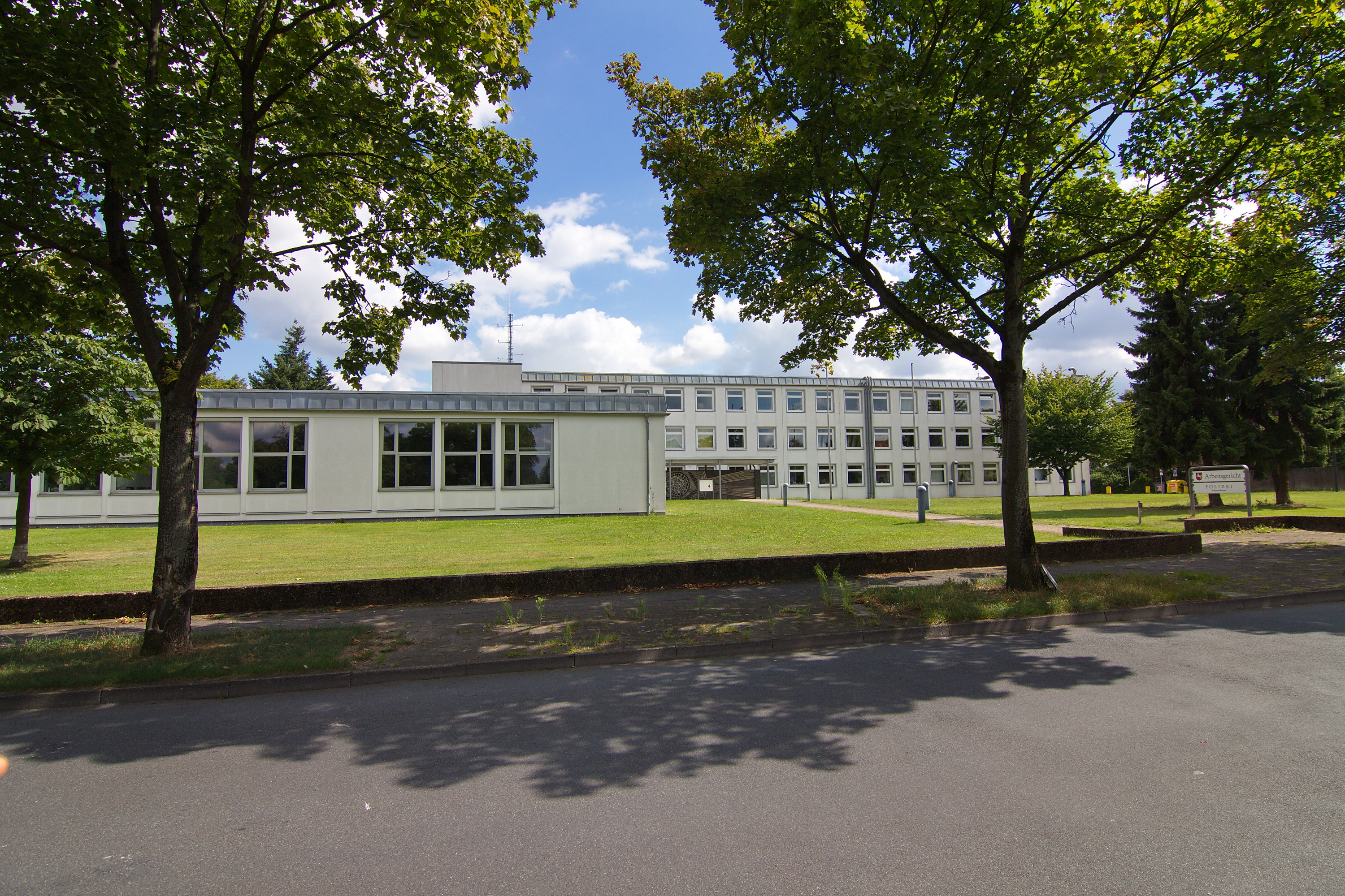 Ortsblick in Verden (Aller), Niedersachsen, Deutschland